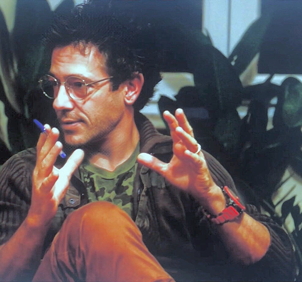 Fabrizio Patriarca al lavoro nello studio di West Egg, Roma, Prati